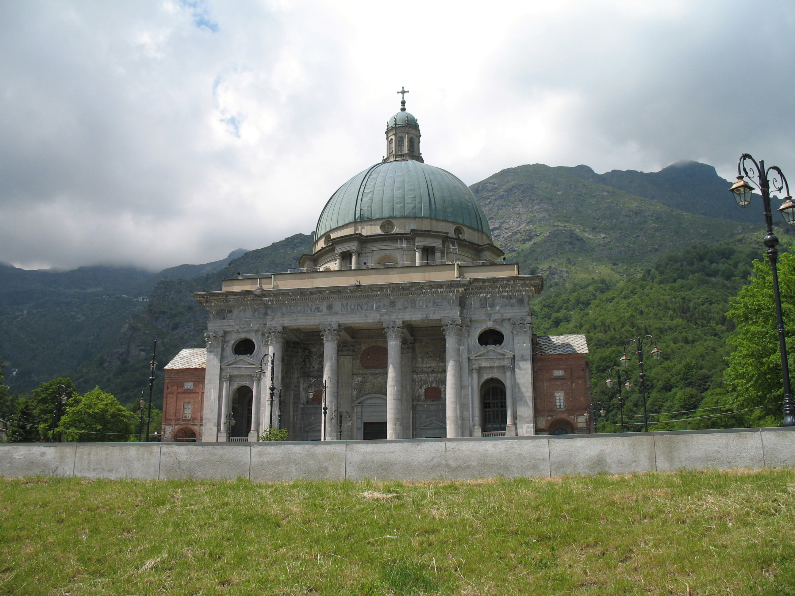 Immagine da Biella